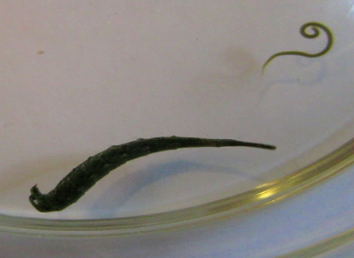 Larve einer Waffenfliege